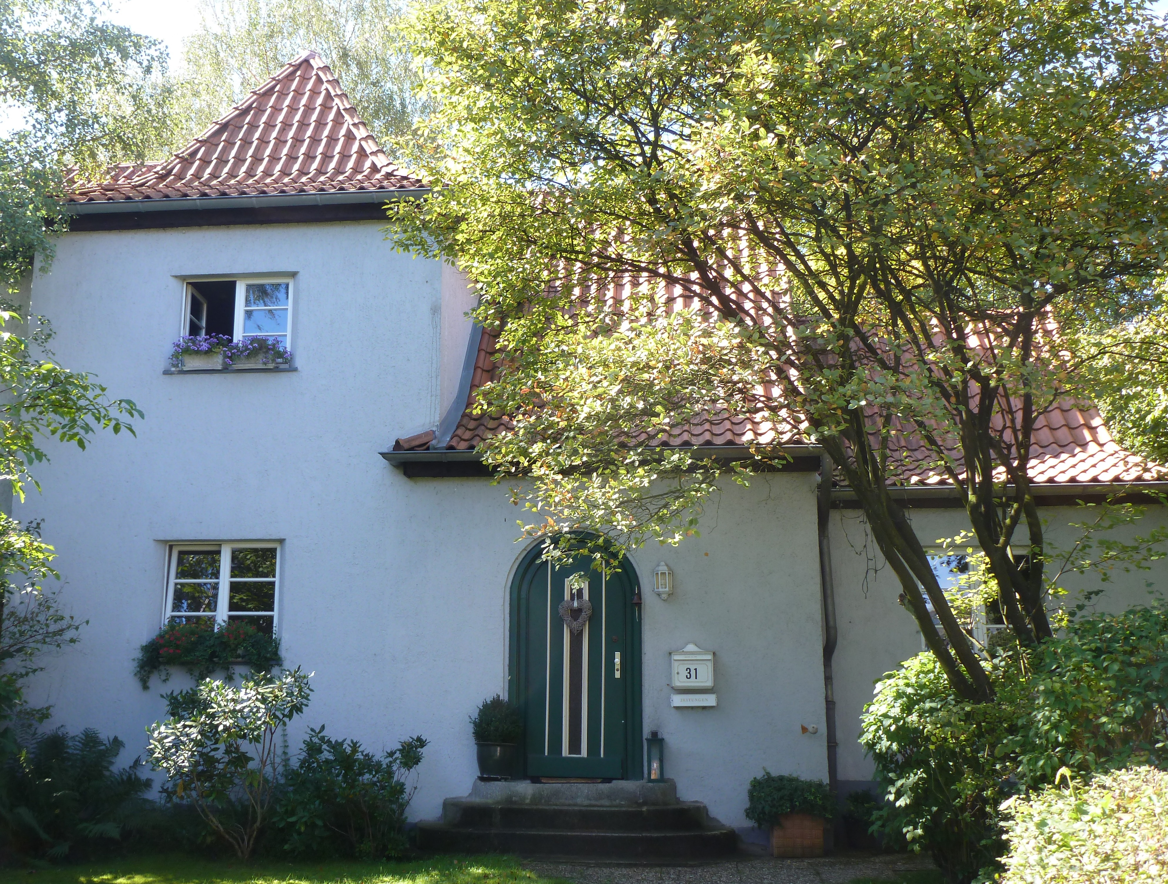 Haus Märchenstr. 31 in Köln-Dellbrück, Denkmal-Nr. 1781